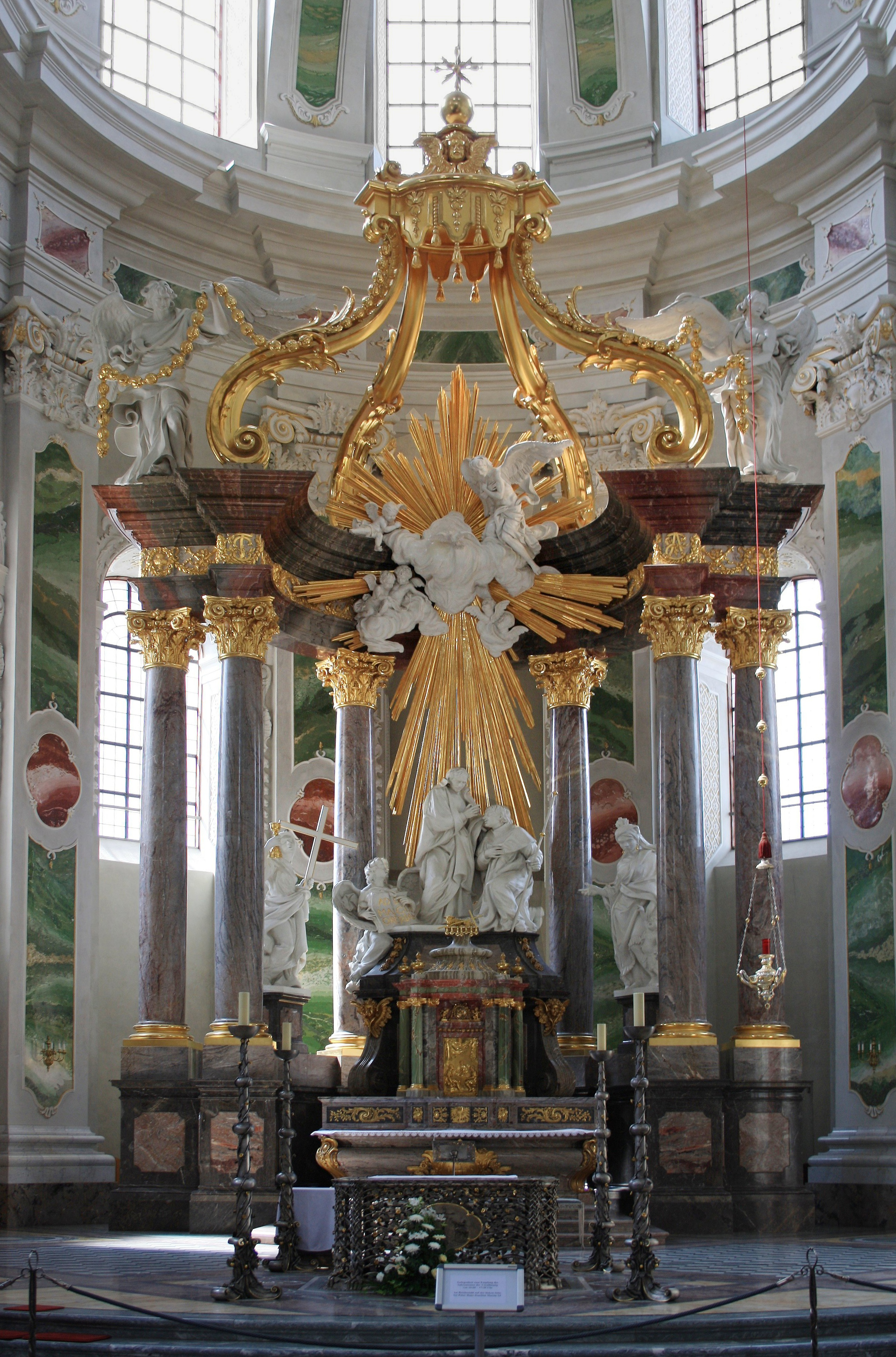 Altar Jesuitenkirche